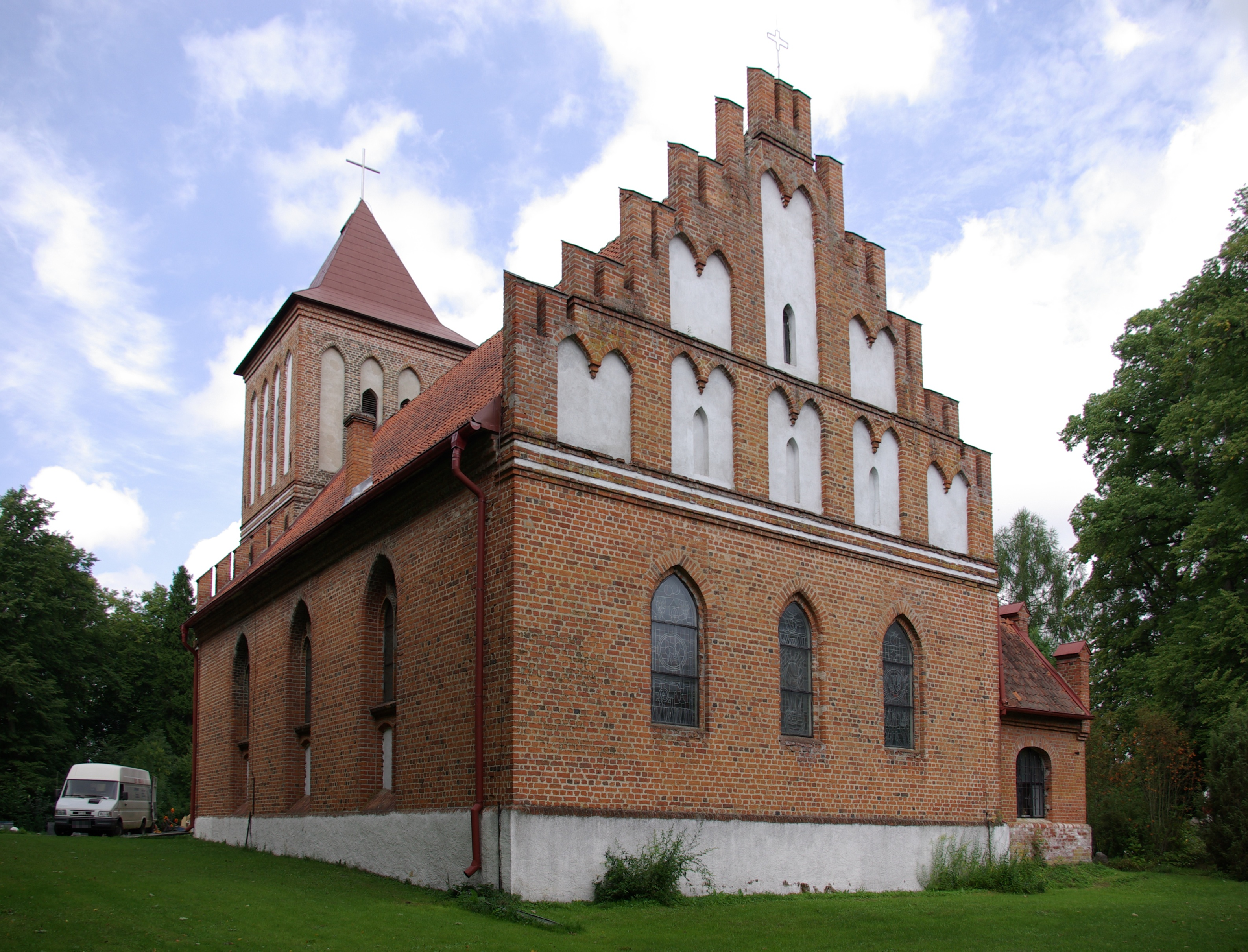 Kuty - dawny kościół ewangelicki, obecnie rzymskokatolicki kościół parafialny p.w. św. Maksymiliana Marii Kolbego, 1586, 1973-1974